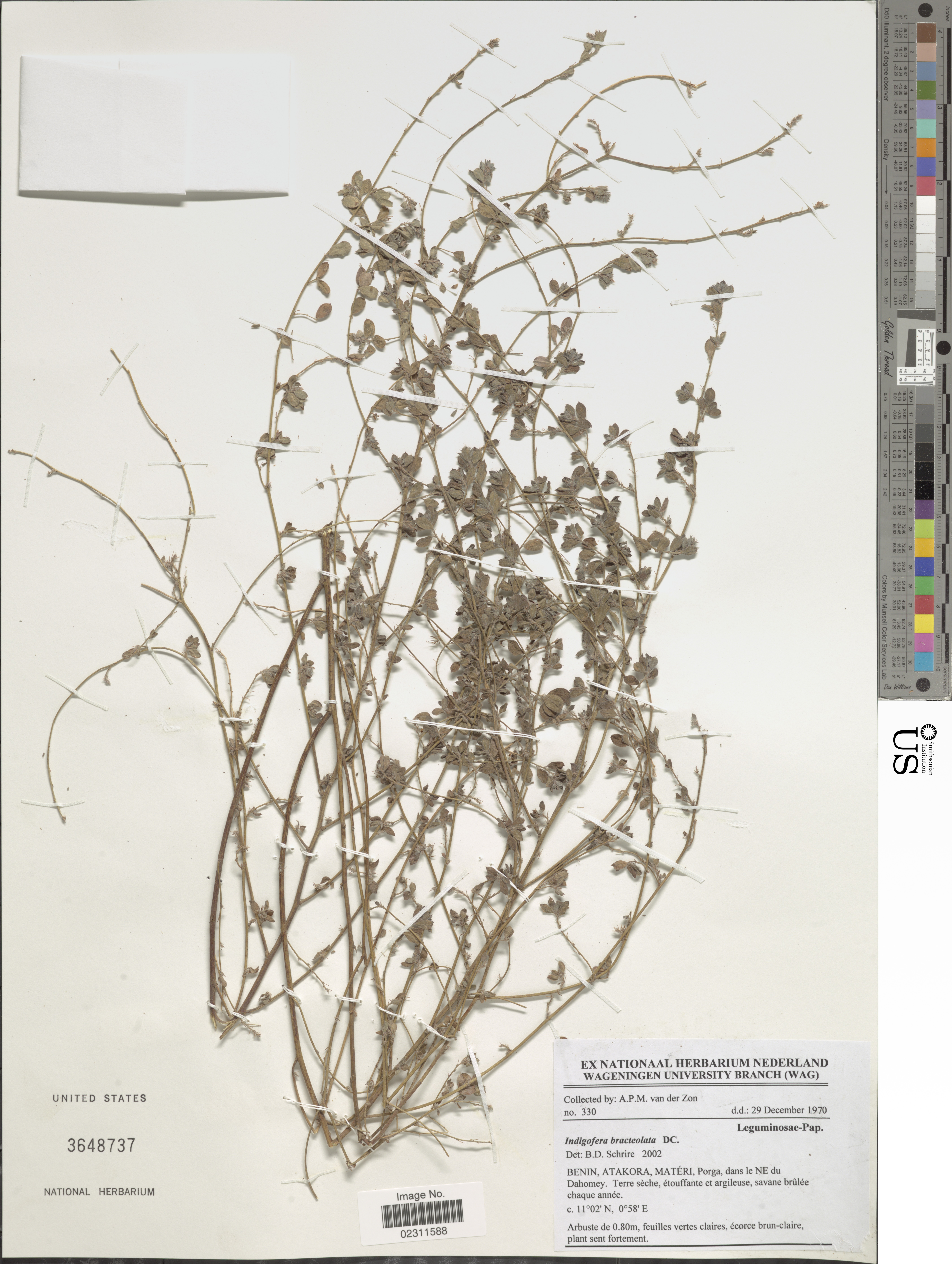 Indigofera bracteolata DC. Object Details Biogeographical Region 22 - West Tropical Africa Collector A. P. van der Zon Record Last Modified 29 Dec 2017 Specimen Count 1 Collection Date 29 Dec 1970 Barcode 02311588 USNM Number 3648737 Place Materi, Porga, dans le NE du Dahomey, Atakora, Benin, Africa Published Name Indigofera bracteolata DC. Taxonomy Plantae Dicotyledonae Rosales Fabaceae Faboideae NMNH - Botany Dept. Record ID nmnhbotany_13322664 Usage of Metadata (Object Detail Text) CC0 GUID (Link to Original Record)